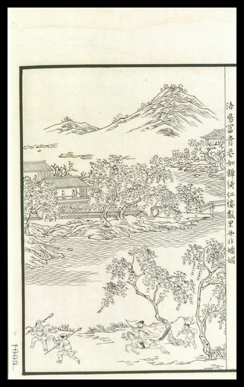 Illustration de la pièce Pipa ji de Gao Ming